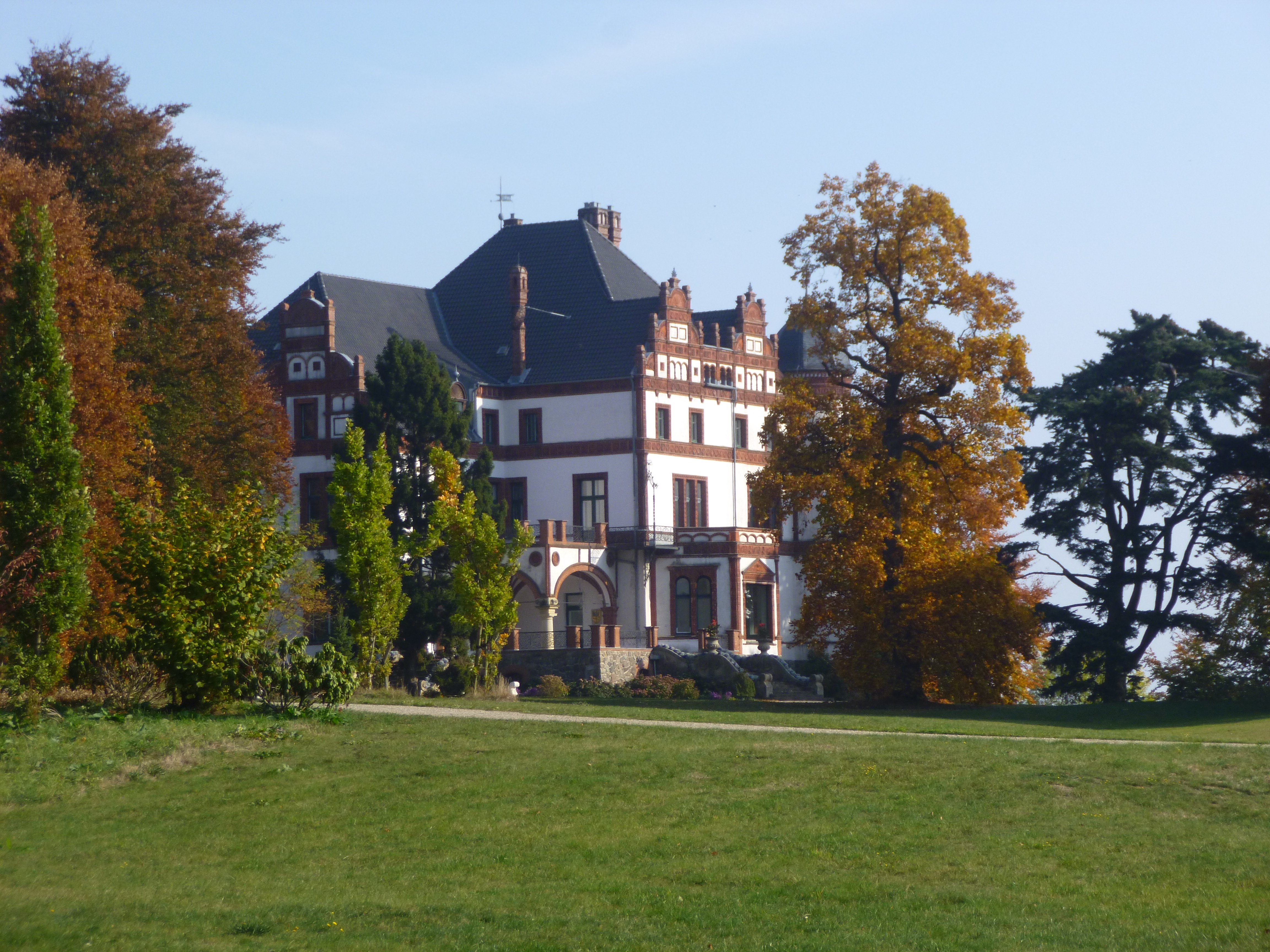 Parkseite von Schloss Wiligrad am Schweriner See